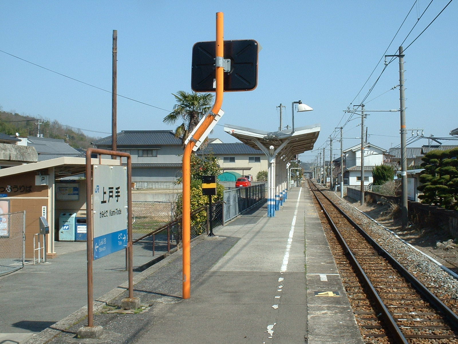 上戸手駅、2006年3月25日に投稿者が撮影